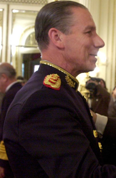 Casa Rosada, Salón Blanco - El presidente Néstor Kirchner saluda al General Bendini.